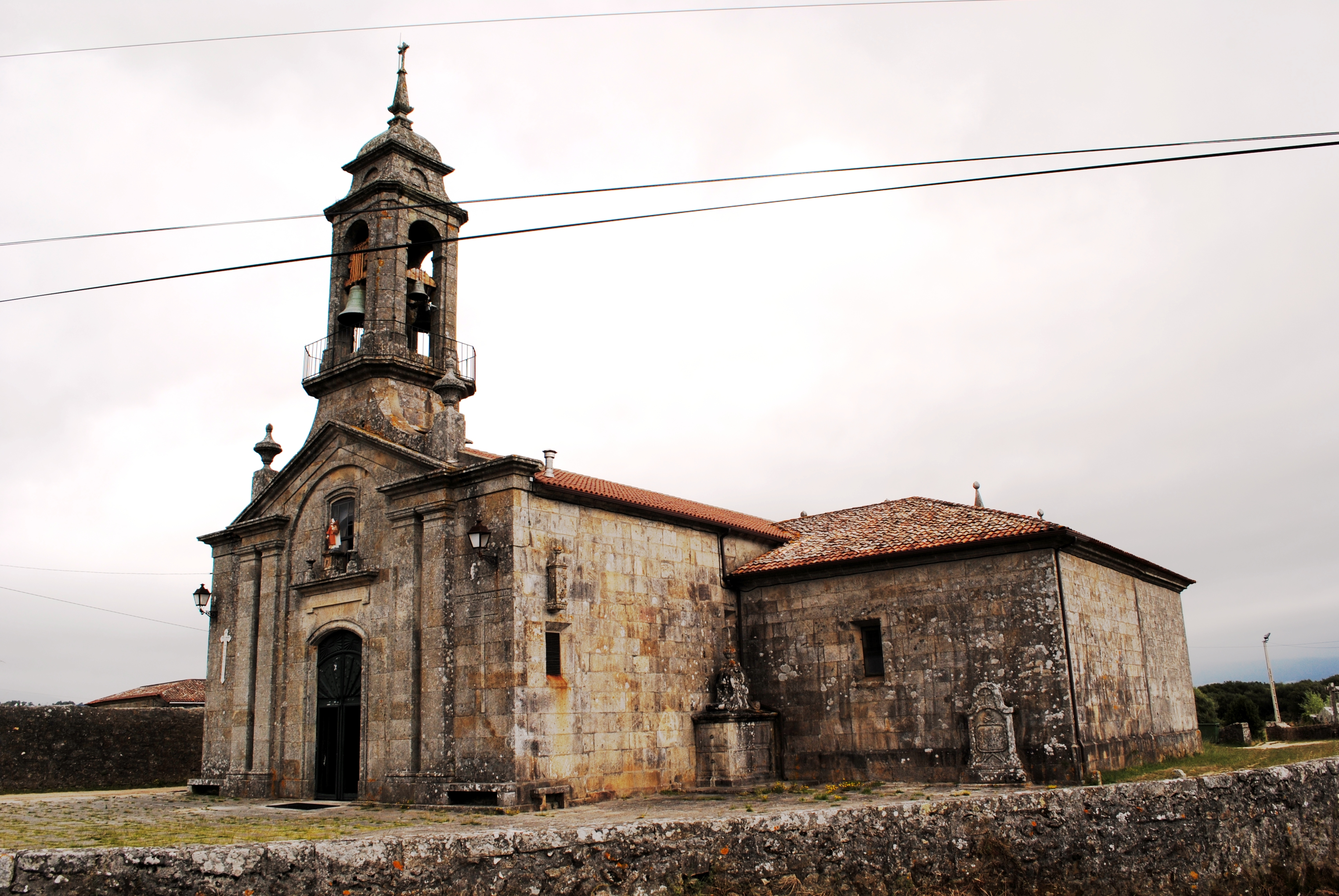 A Guarda, S. Lourenzo de Salcidos, igrexa parroquial.